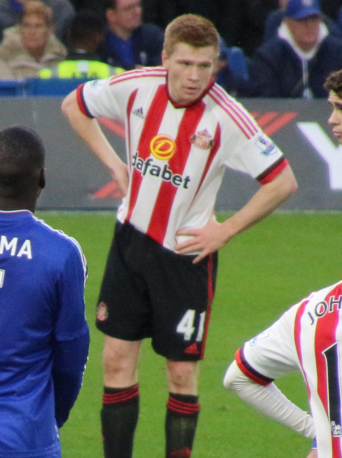 Chelsea 3 Sunderland 1